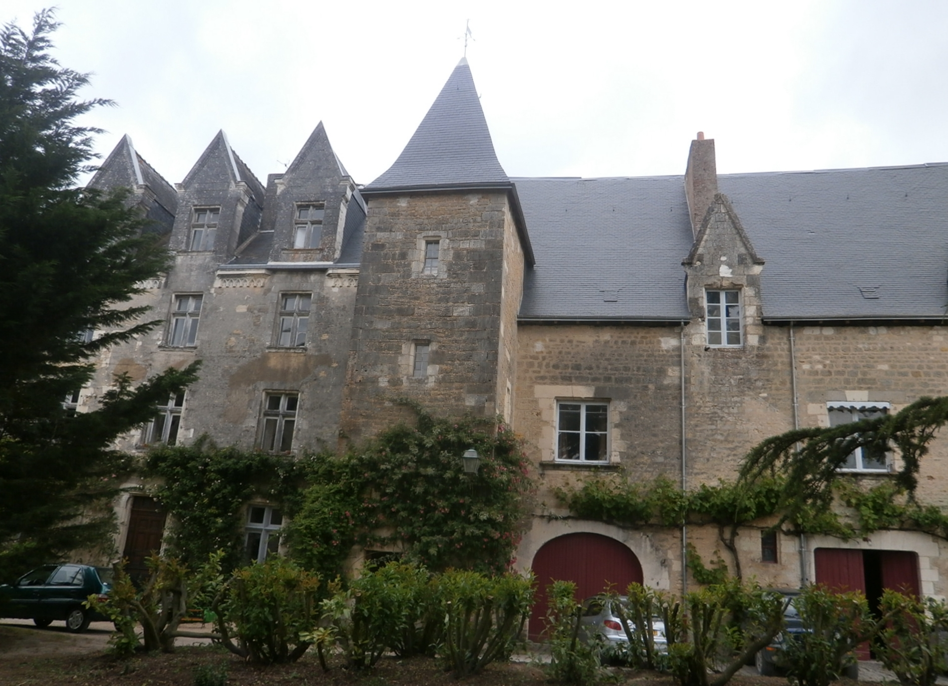 Les communs du château de Montrésor.